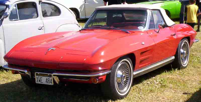 Chevrolet Corvette 1964